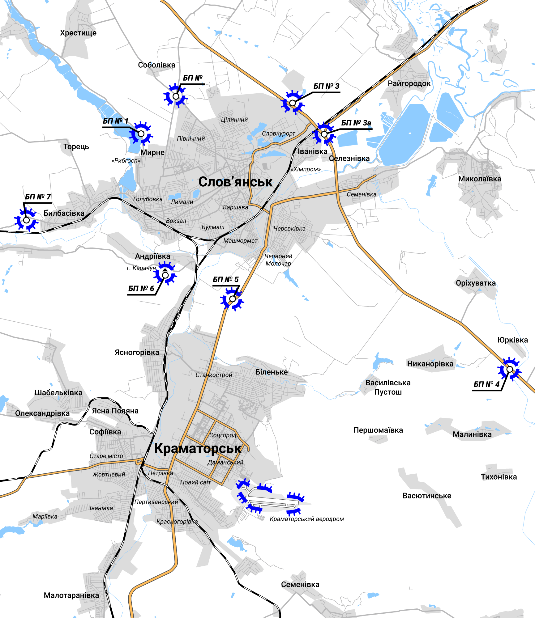 Розташування блокпостів сил АТО в районі Слов'янськ-Краматорськ в травні-червні 2014 р.